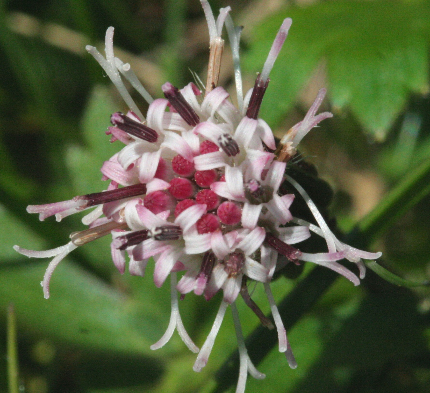 Tossilaggine alpina - Località : Cima Sappada, Sappada (BL), 1290 m s.l.m.